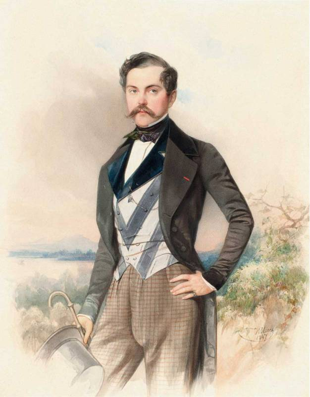 Никола́й Влади́мирович А́длерберг (1819—1892) — граф, русский государственный и военный деятель.